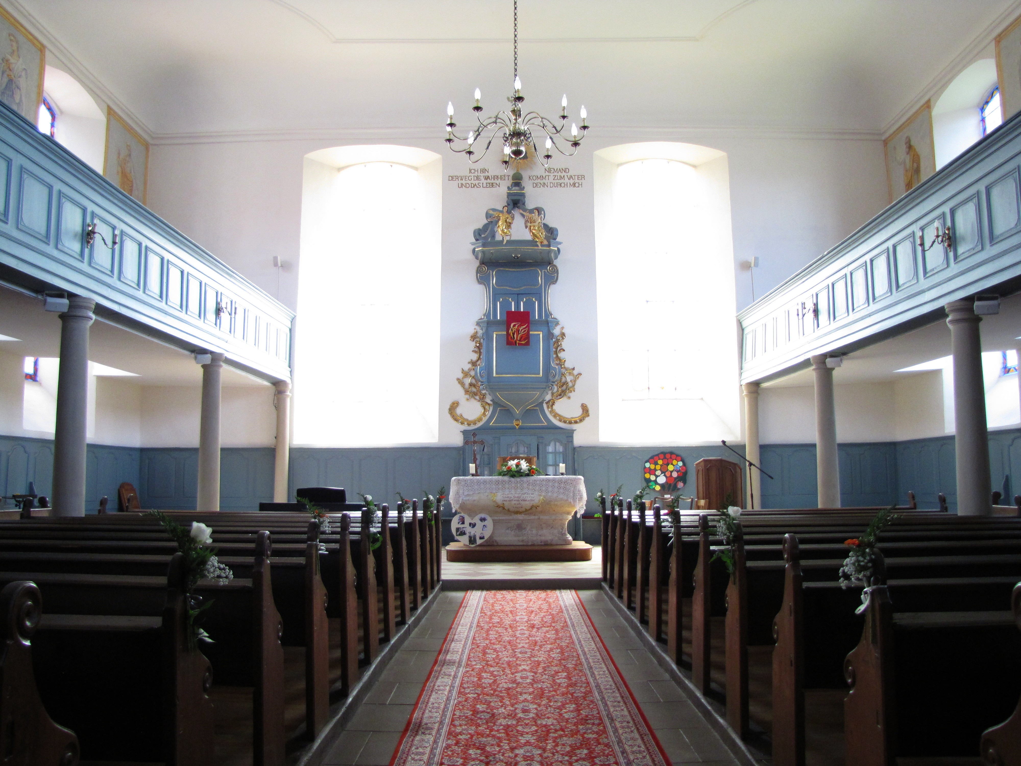 Alsace, Bas-Rhin, Église protestante de Harskirchen (PA00084744, IA67005797). Vue intérieure vers l'autel-chaire (1766-1769): This object is classé Monument Historique in the base Palissy, database of the French furniture patrimony of the French ministry of culture, under the references IM67009104 and IM67009105.